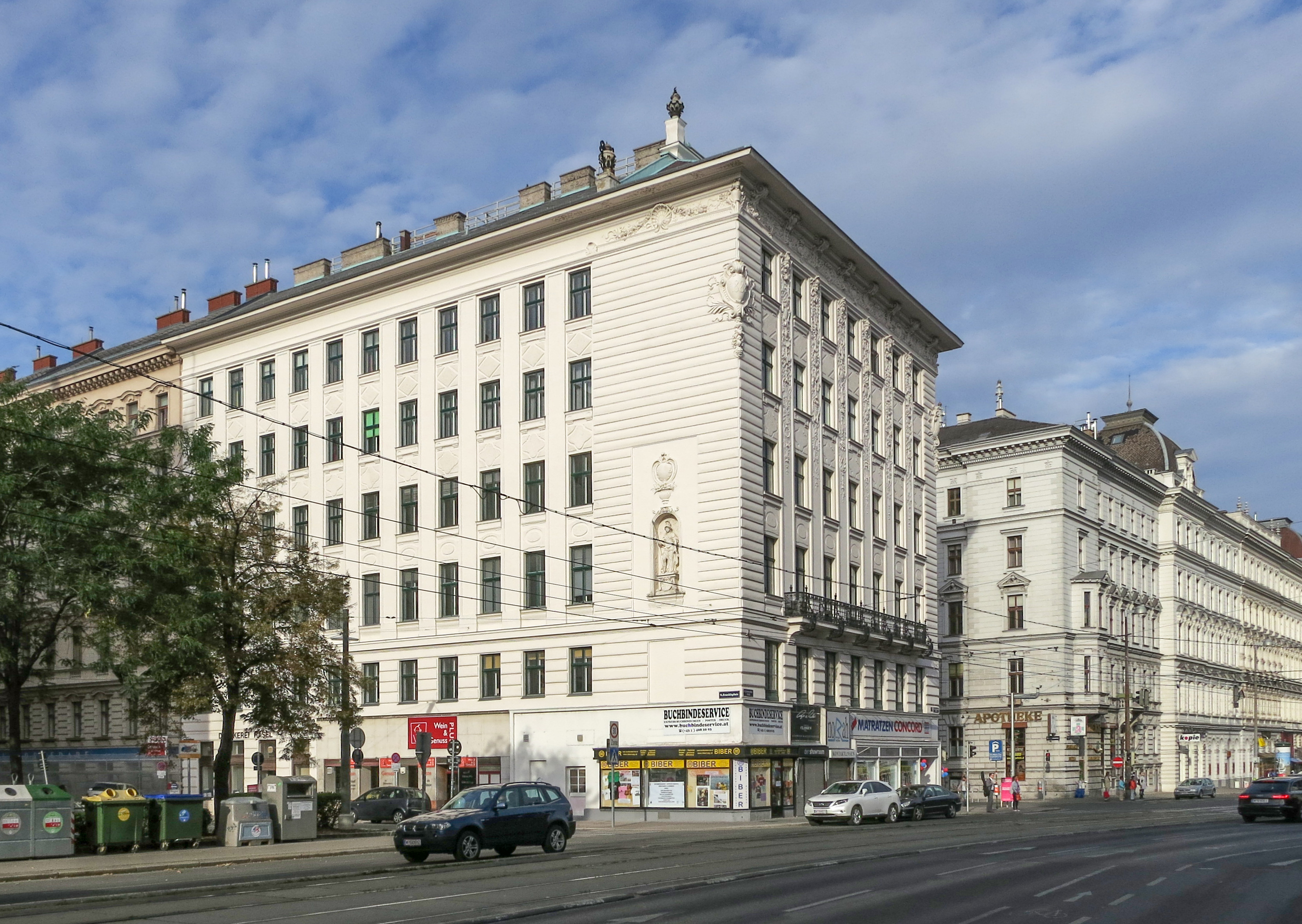 Miethaus, Hosenträgerhaus